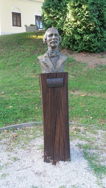 Bista Antuna Mihanovića u Tuheljskim Toplicama